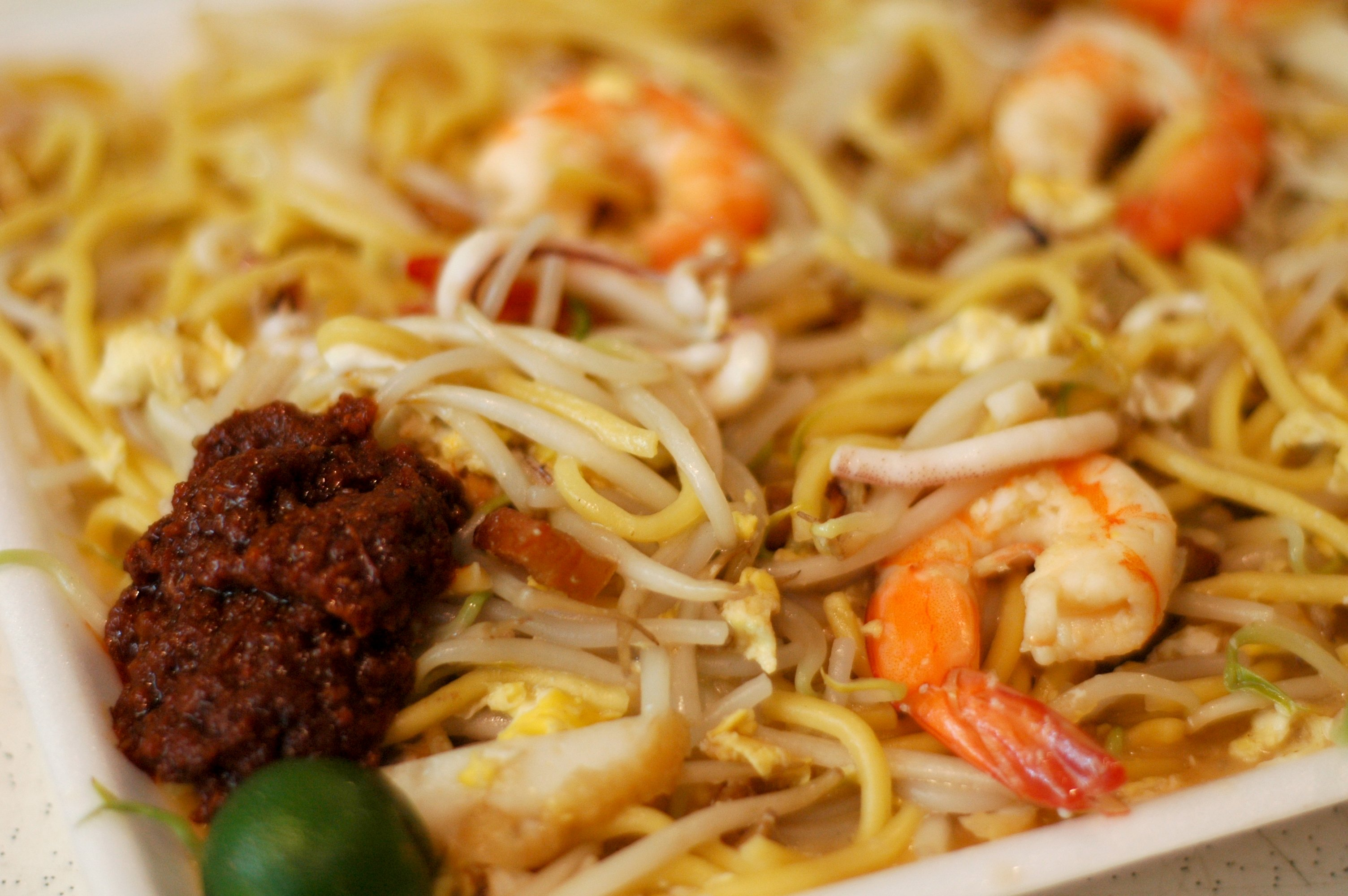 Singapore-style hokkien mee (prawn noodles), at Newton Hawker Centre